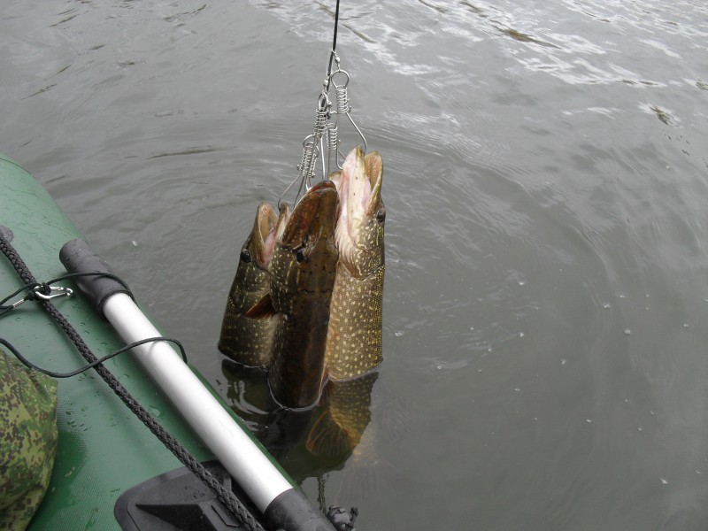 Рыба на кукане